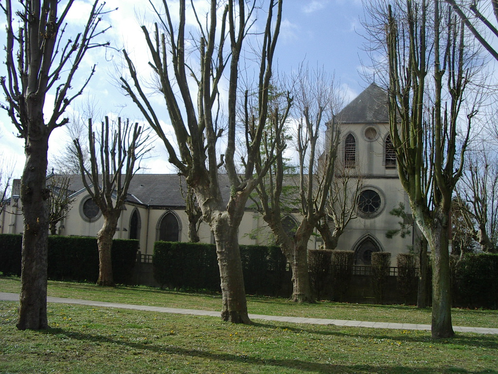 Eglise Saint Joseph Oignies